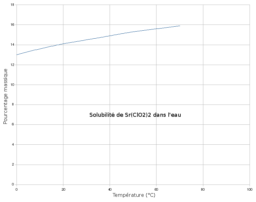 Solubilité de Sr(ClO2)2 dans l'eau en fonction de la température.